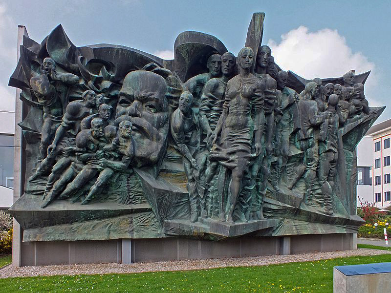 Bronzerelief "Aufbruch" von Klaus Schwabe. Ehemals am Hauptgebäude der Karl-Marx-Universität Leipzig, jetzt auf dem Campus Jahnallee neben der Mensa